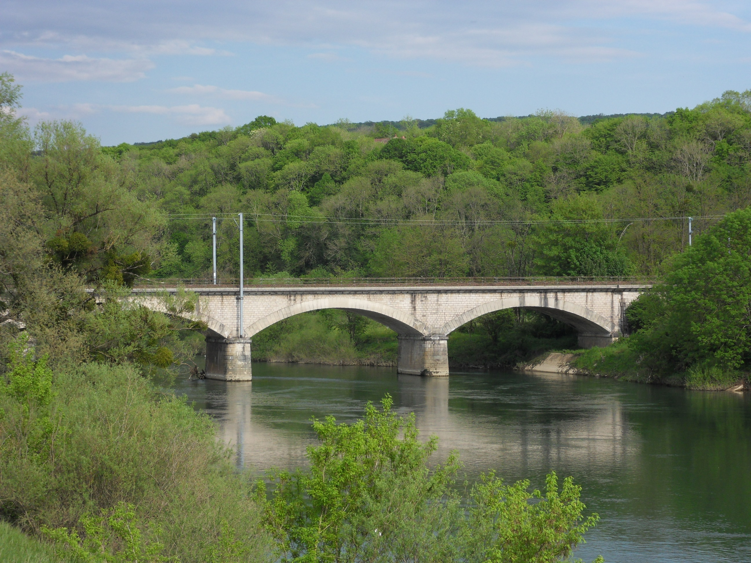 Localité de Osselle-Routelle. Pont ferroviaire sur le Doubs. Ligne de Ligne de Franois à Arc-et-Senans.